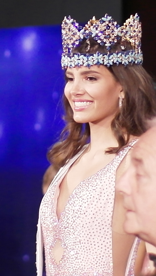 MGM Grand, DC